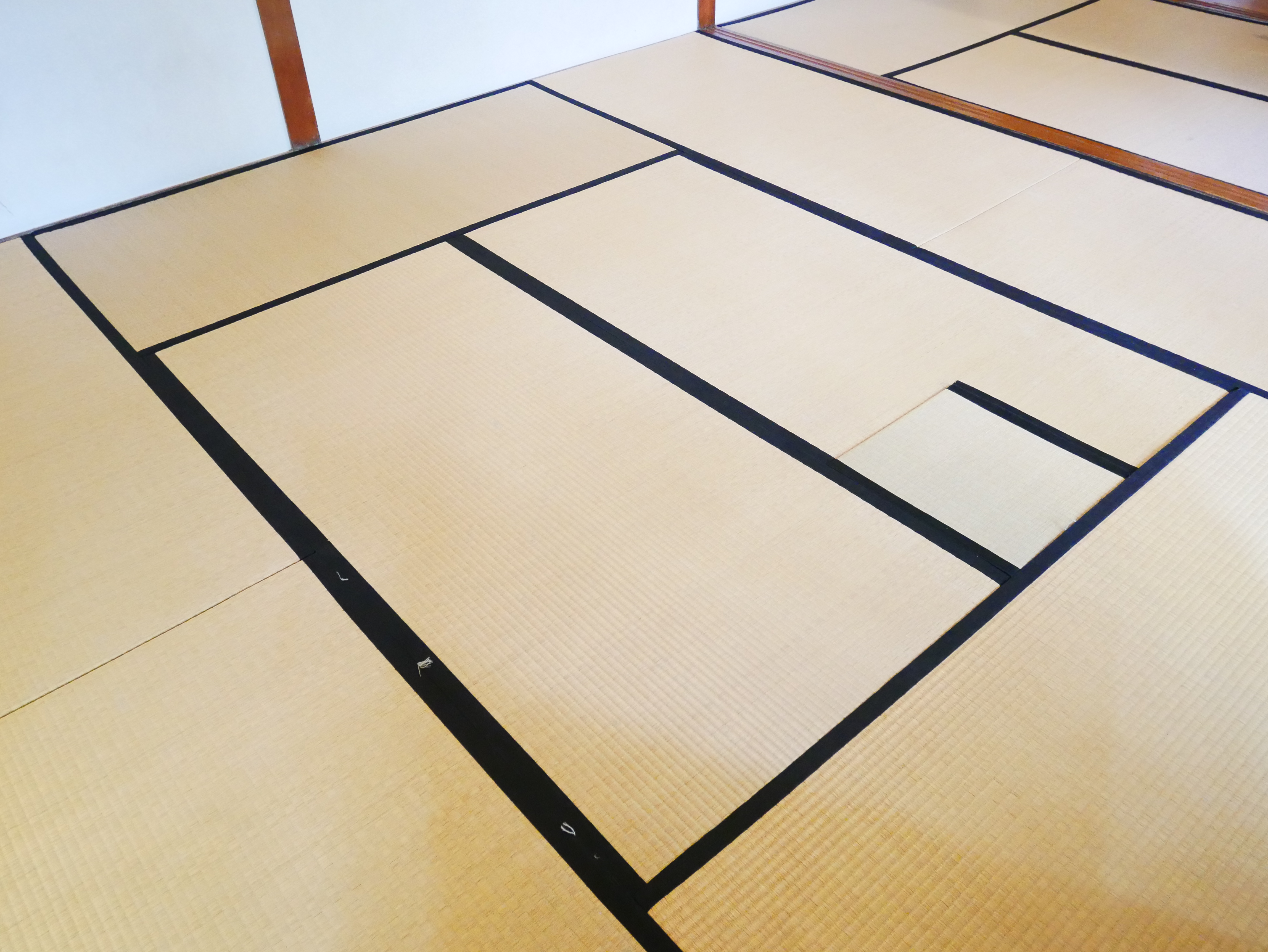 佳山旅館客房疊蓆，臺北市北投區新北投次分區林泉里